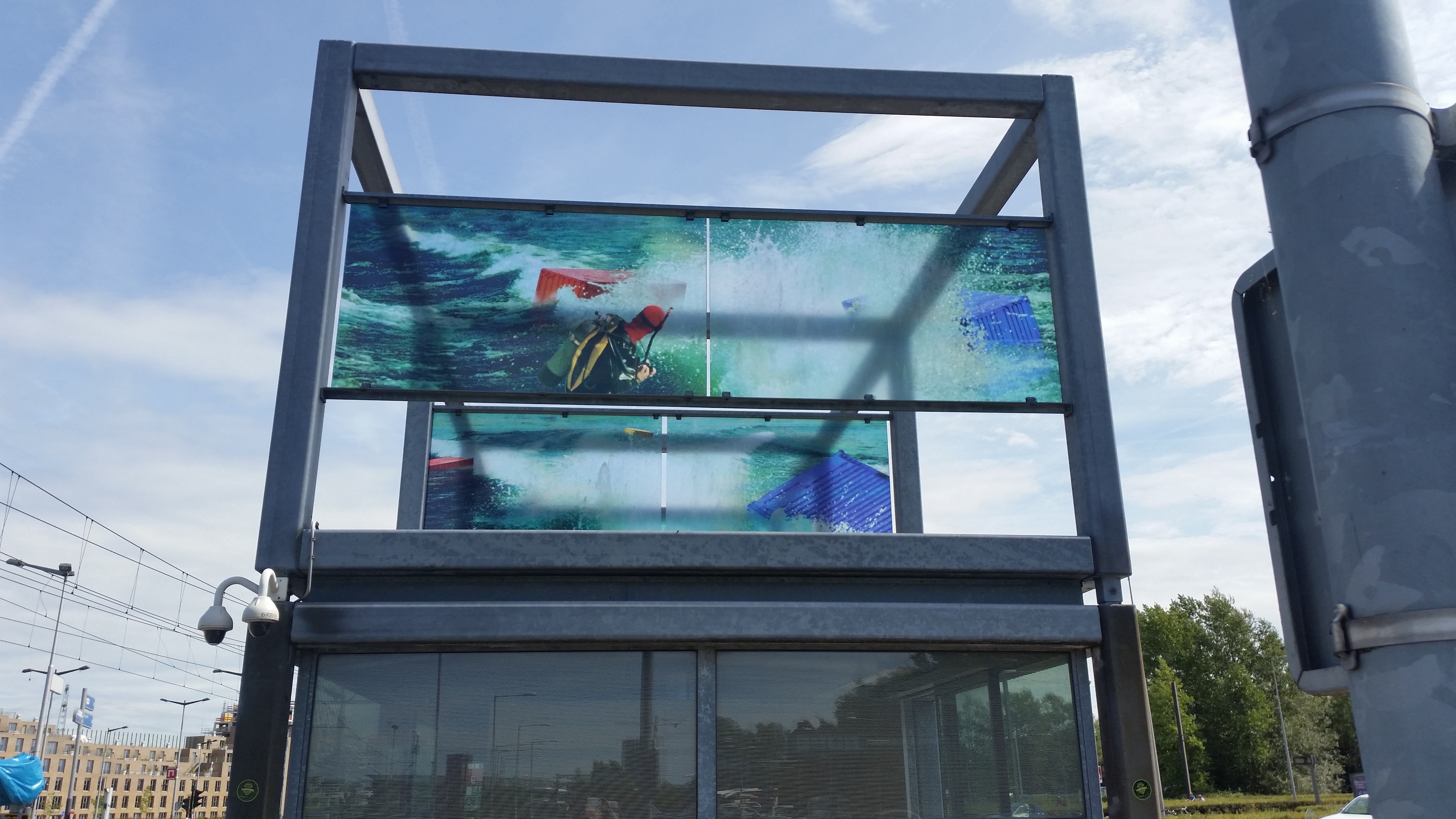 Maalstroom nr. 2, vanaf de tramhalte